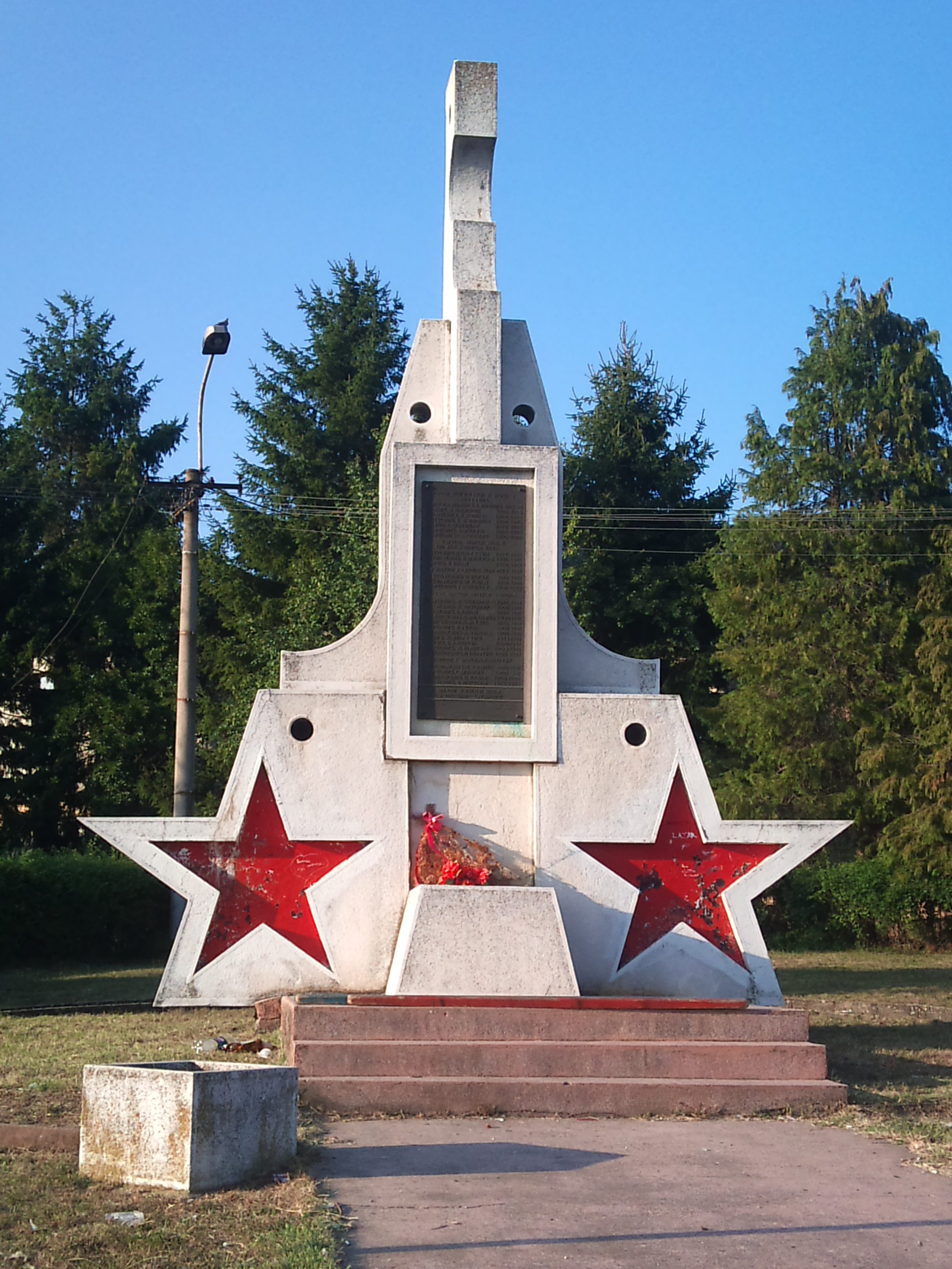 Споменик из народноослободилчке борбе